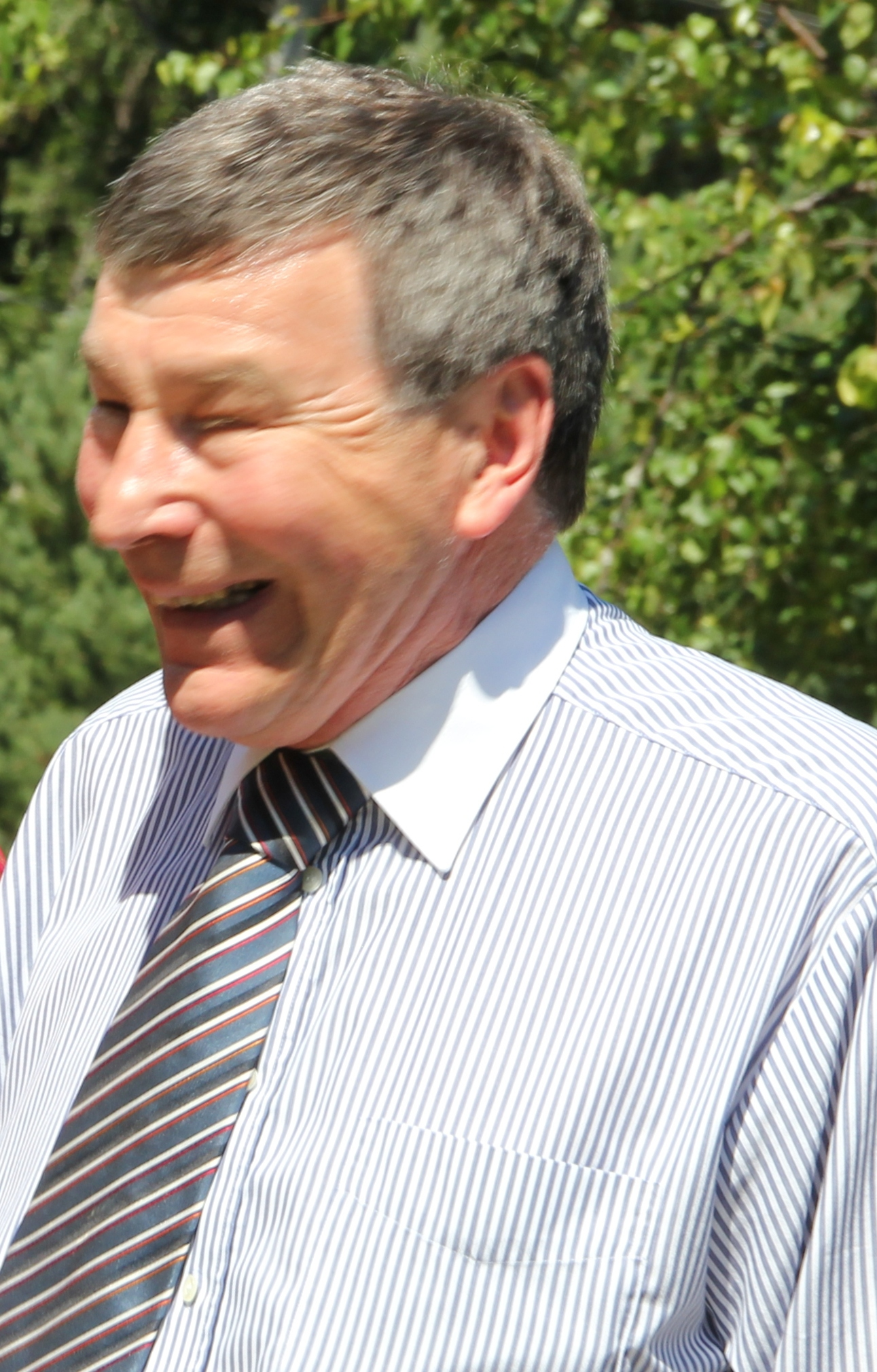 Akavan entinen puheenjohtaja, sammattilainen paikallisaktivisti